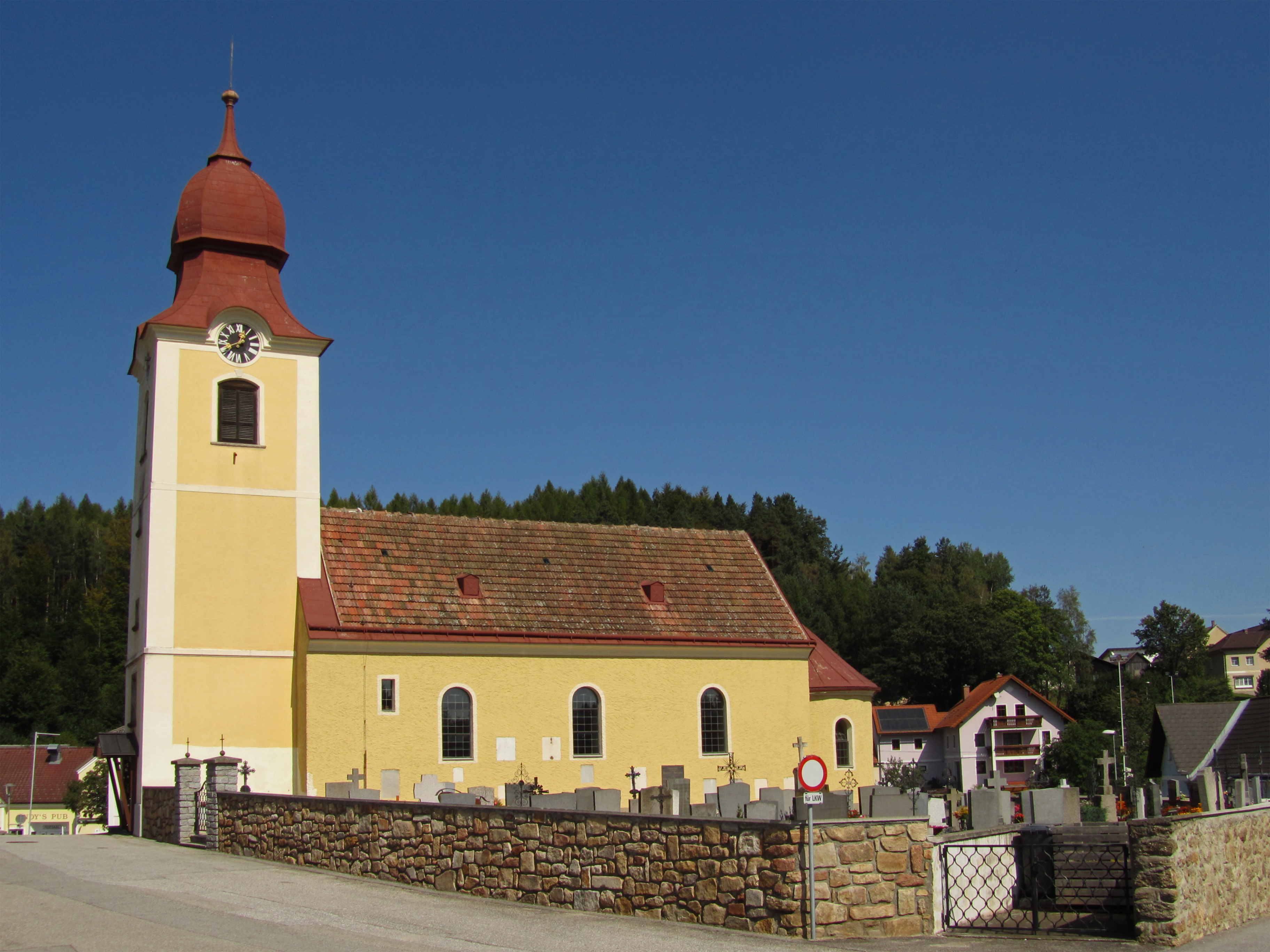 Romanische Landkirche aus dem 13. Jahrhundert; Ende des 18. Jahrhunderts barockisiert. Von Friedhof umgeben.